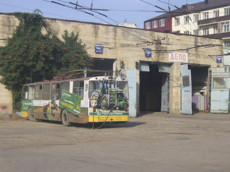 Троллейбусное депо Махачкалы